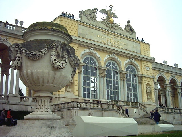 Wien (Österreich): Schloss und Park Schönbrunn - die Gloriette Bildautor: Peter Bubenik - Aufnahmedatum: 01.11.2004 Kategorie:Bild:Schloss